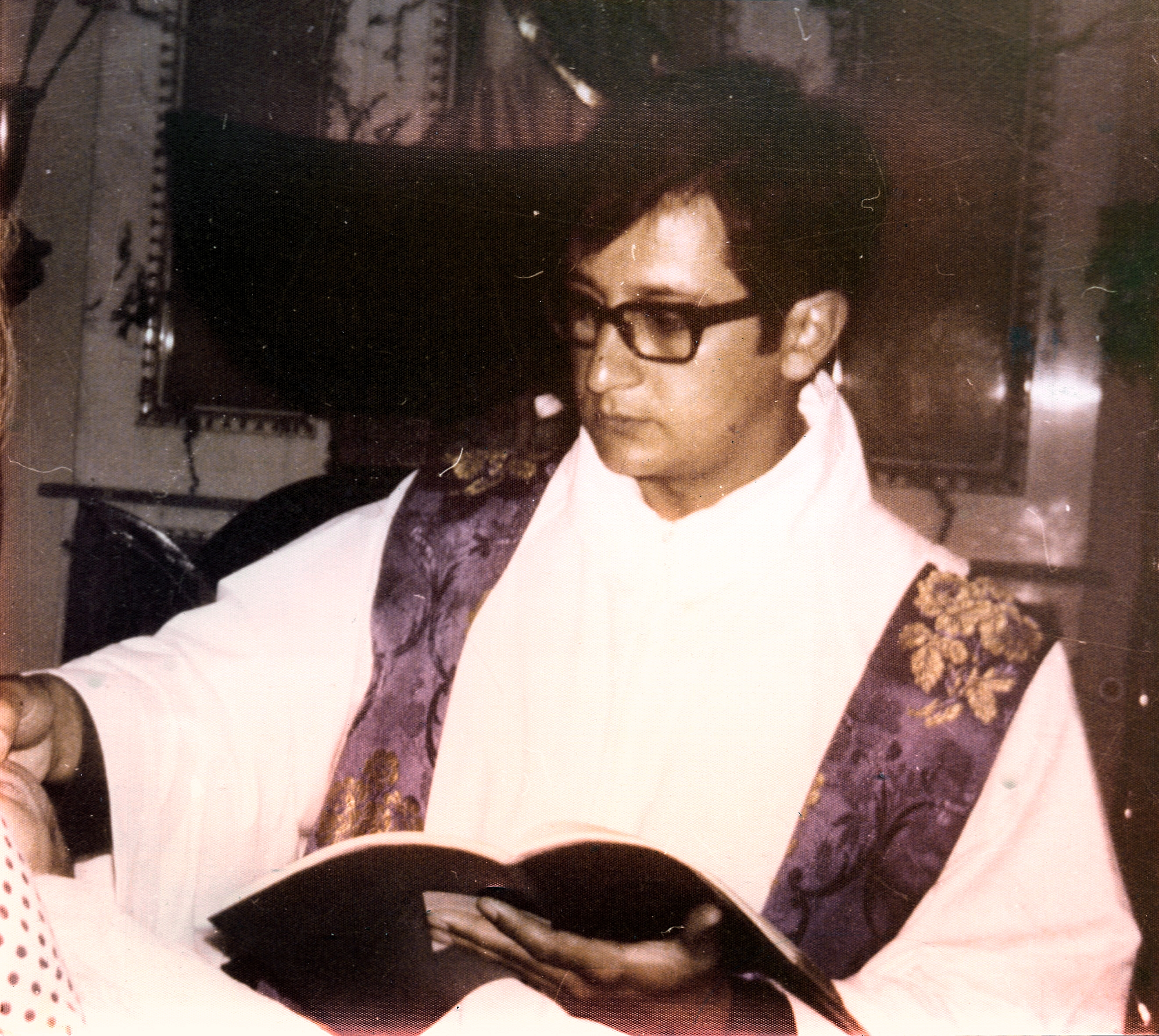 Carlos Murias en el bautismo de su sobrino.